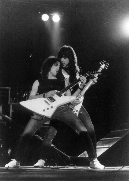 Ángeles del Infierno, Donosti